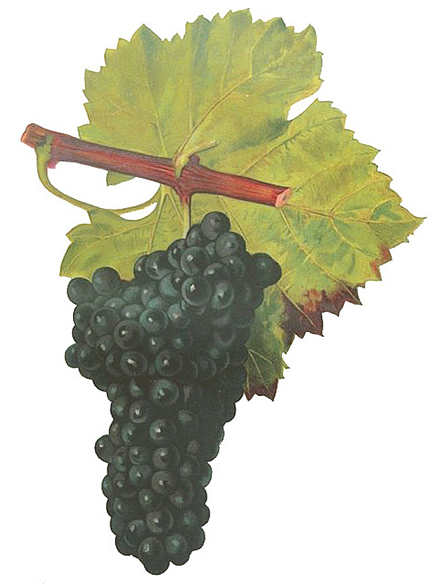 Grappe de Groslot de Cinq Mars par Viala et Vermorel